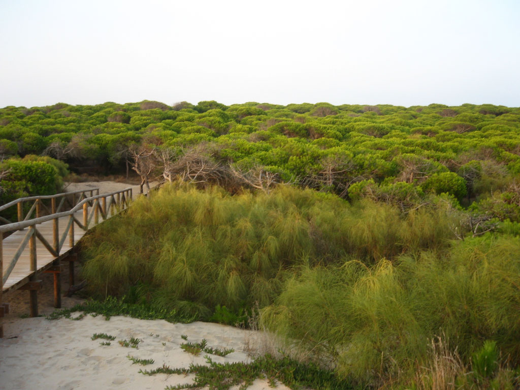 Pinar marítimo de la playa de Punta Candor, en Rota-Cádiz-Andalucía-España